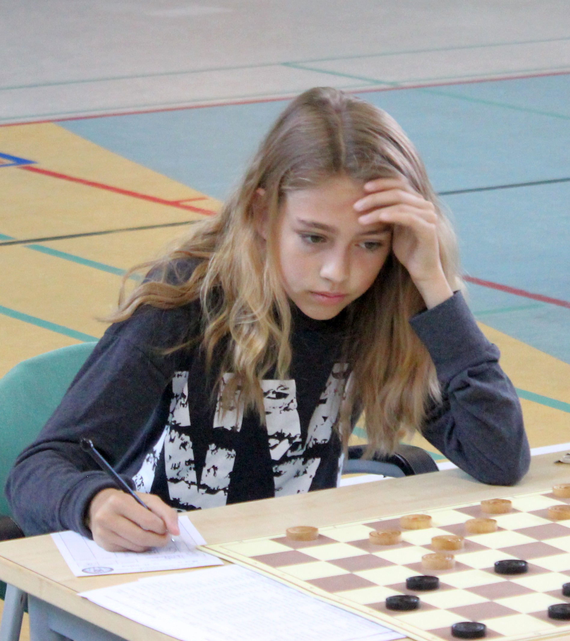 Triinu Jalg mängimas rahvusvahelisel kabeturniiril Jõgeva-2017